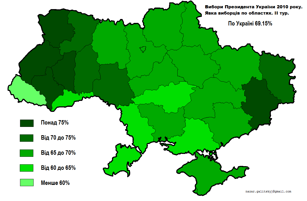 Явка виборців на виборах Президента України 2010 ІІ тур